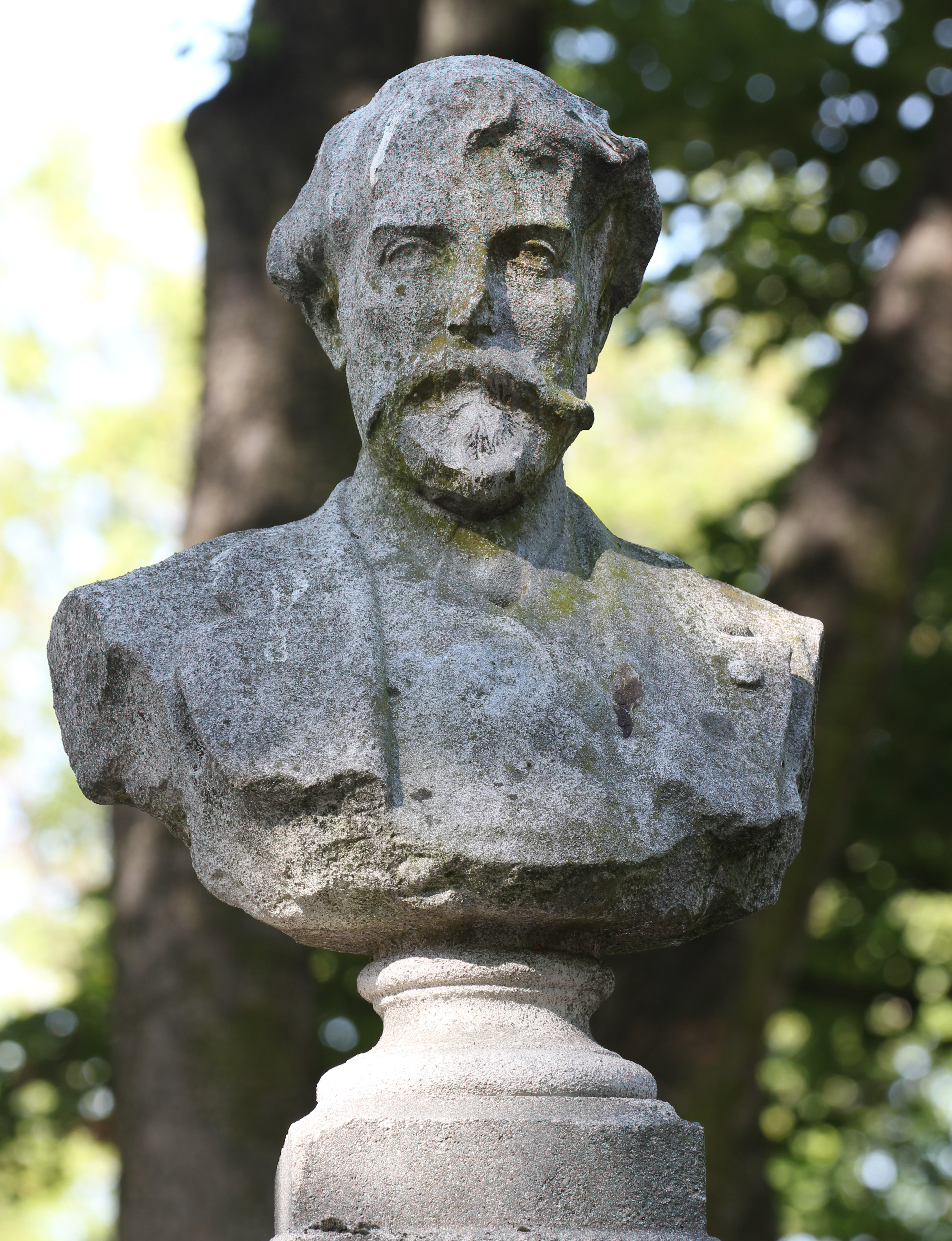 Statue